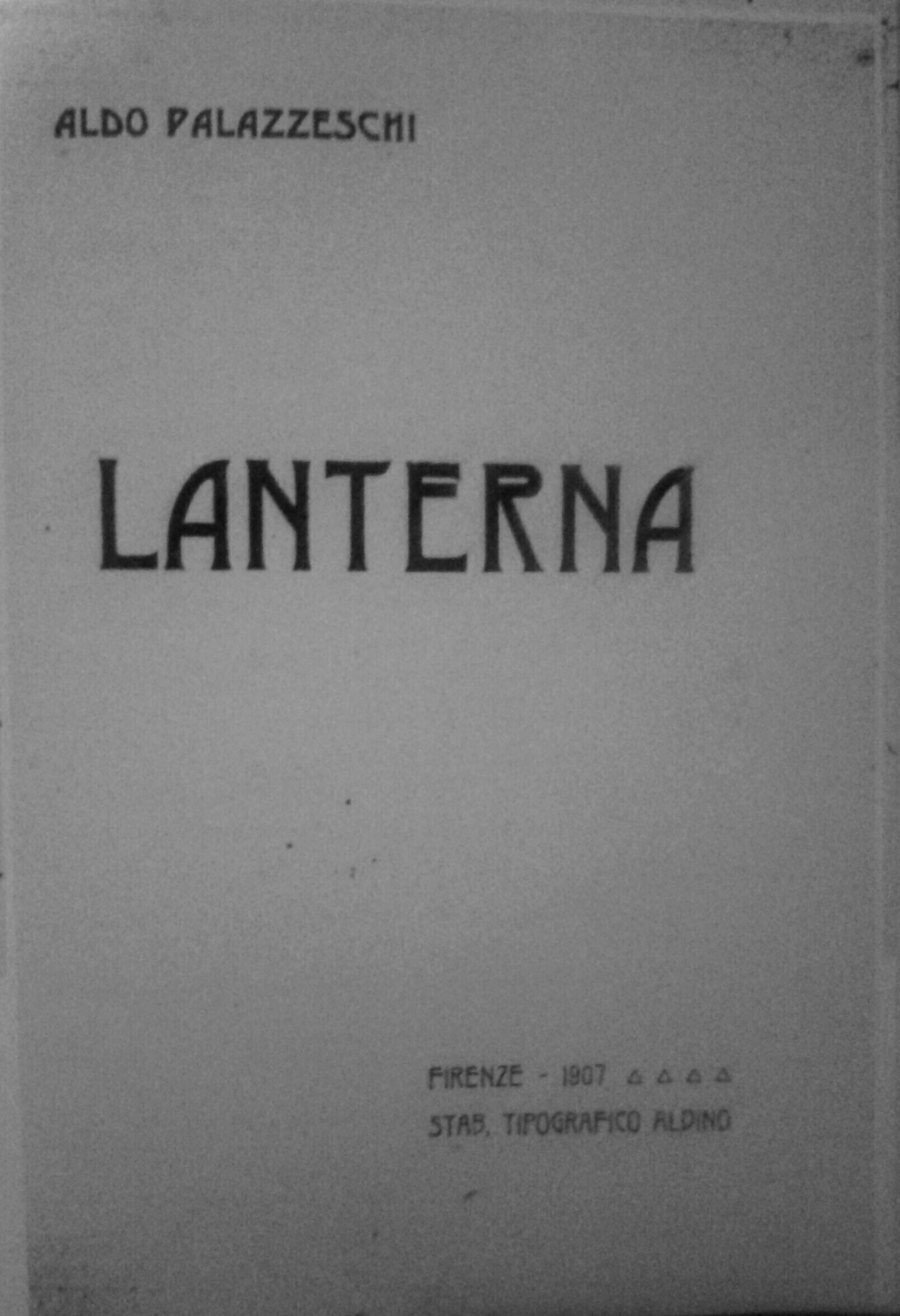 Cover of the book Lanterna by A. Palazzeschi, first edition, pubblished in 1907